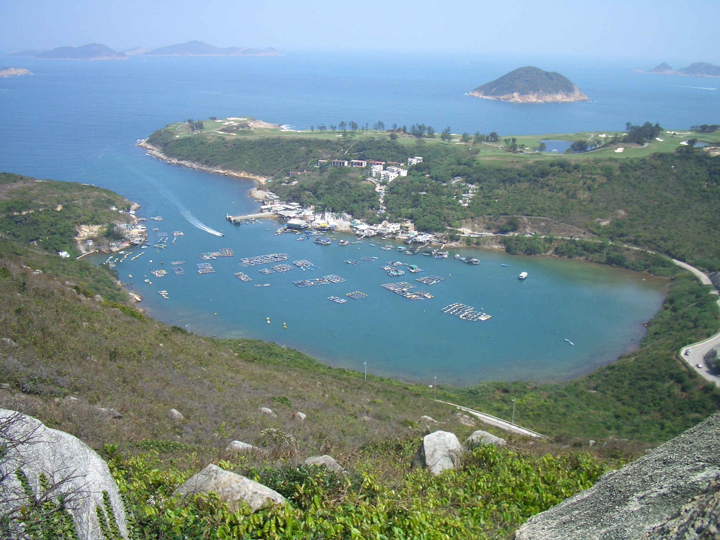 香港布袋澳